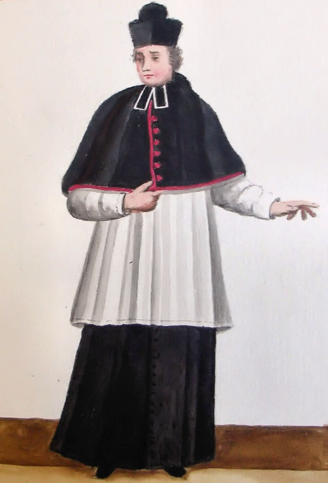 Manuscript:,Ludovicus Clercq and Leo Vlaming, ghent 1812, Waerachtige verbeeldingen van alle de cleedingen der religieuse ordens